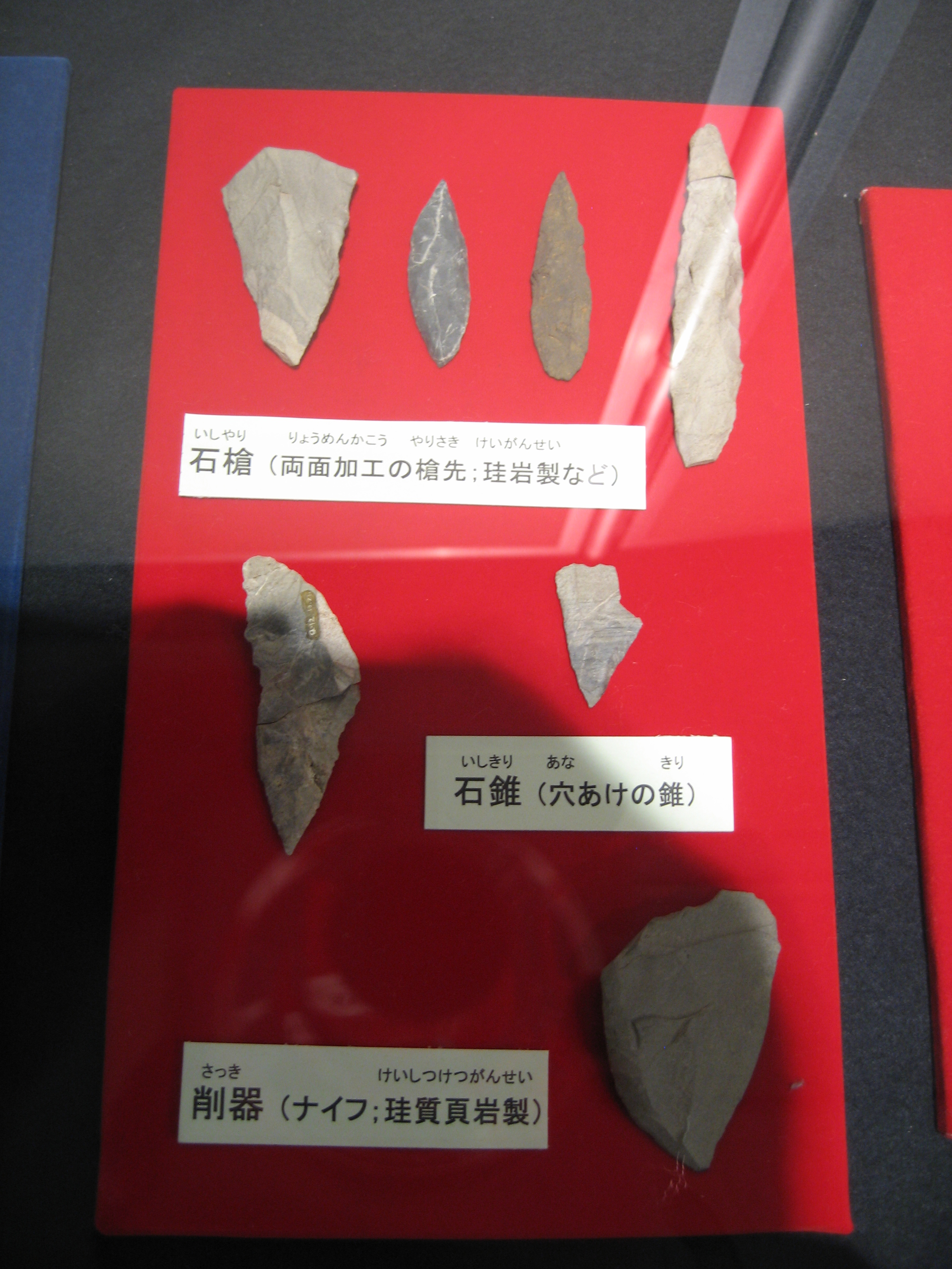 日本の旧石器時代に用いられた様々な打製石器